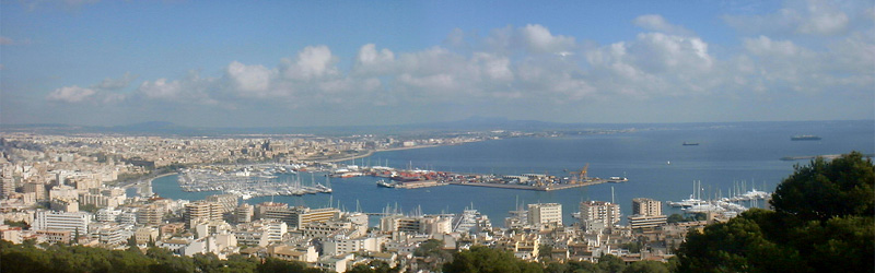 Stadtansicht von Palma de Mallorca. Ansicht vom Castell Bellver